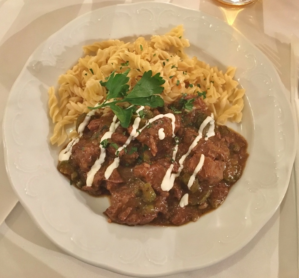 Matrosenfleisch mit Bandnudeln, Waldviertler Hof, Wien 2017